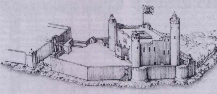 Veduta del Castello Maniace a Siracusa in un disegno del 1630.